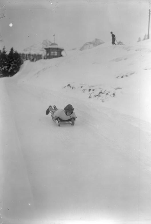 Blick auf die Skeleton-Bahn während des Konkurrenzkampfes.